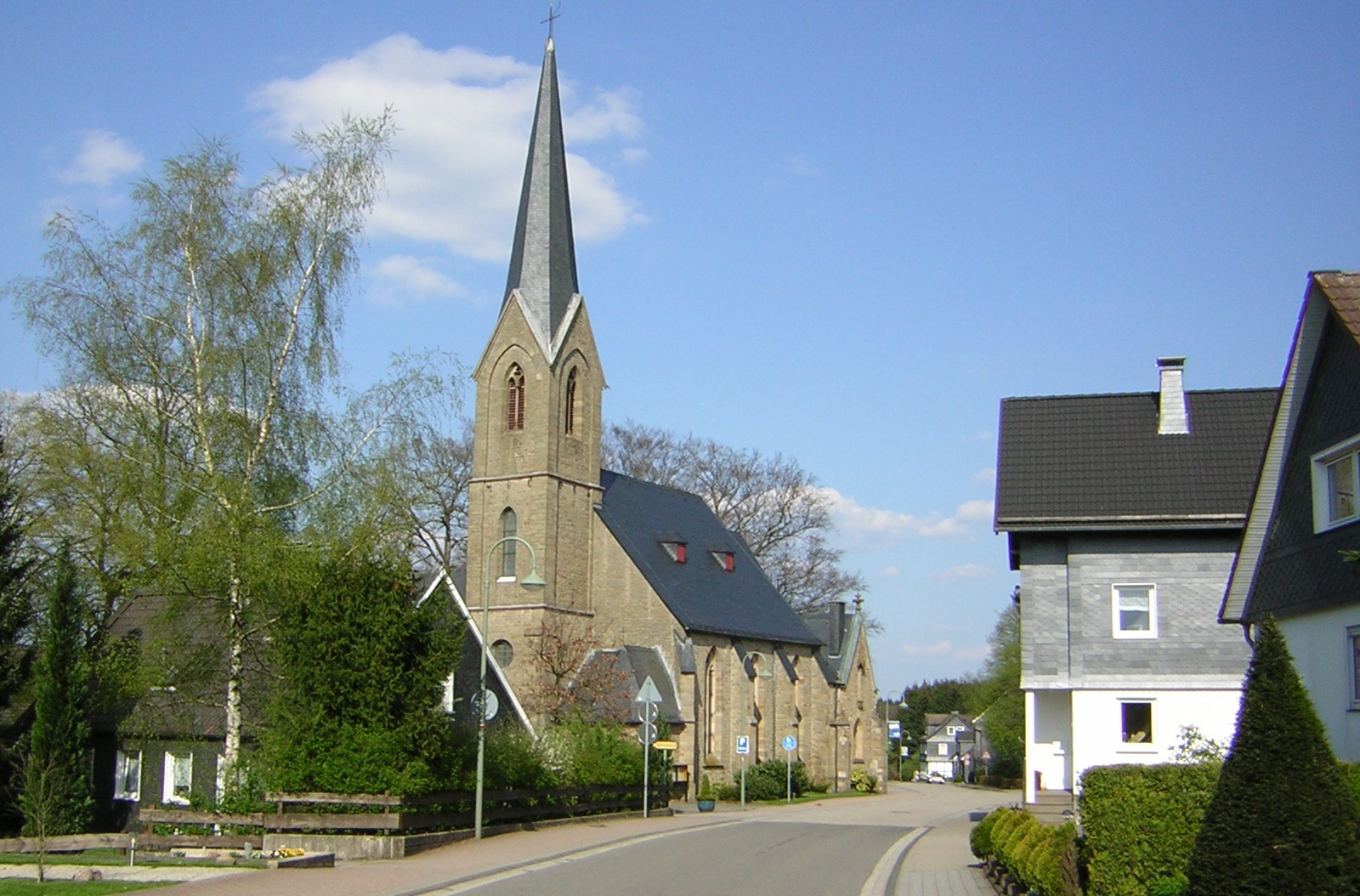 Beschreibung: Kirche St. Agatha in Agathaberg, Wipperfürth Fotograf: Trexer Aufgenommen: 2005 mit Nikon Coolpix 2200 Kategorie:Bild:Kirche